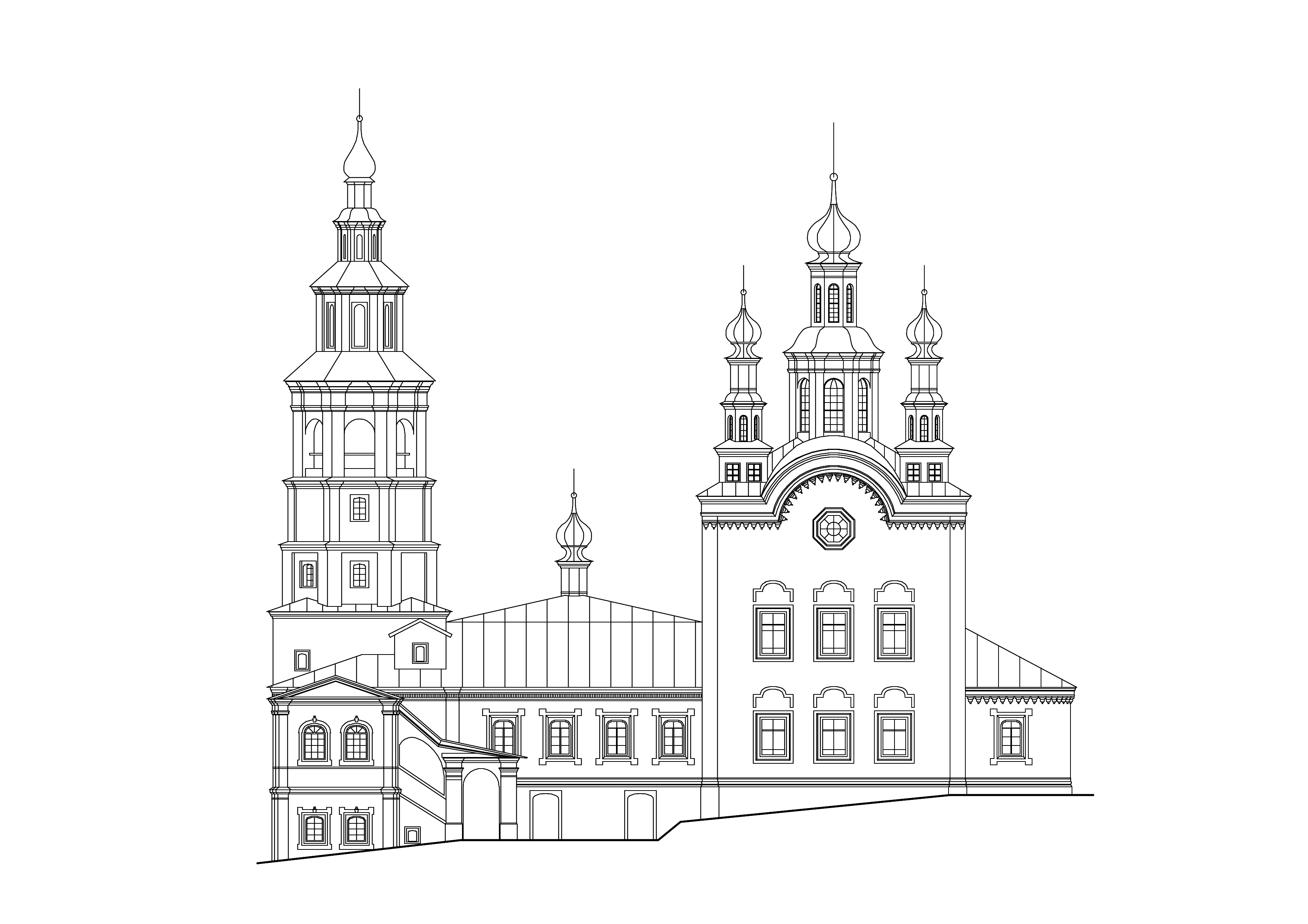 Воскресенская церковь. Город Соликамск